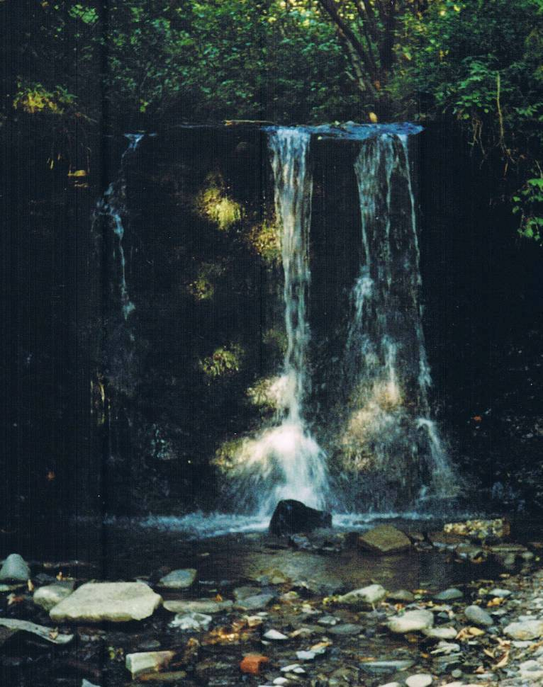 Wodospad w Wetlinie (Bieszczady). Waterfall in Wetlina (Polish Bieszczady).